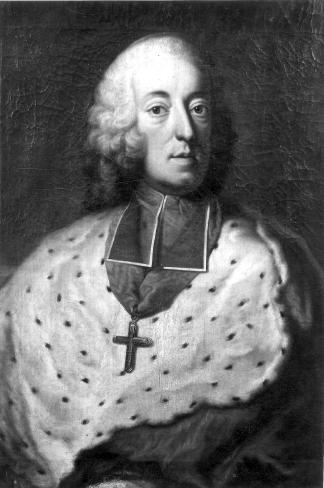 Prince-évêque Jean-Theodore de Bavière